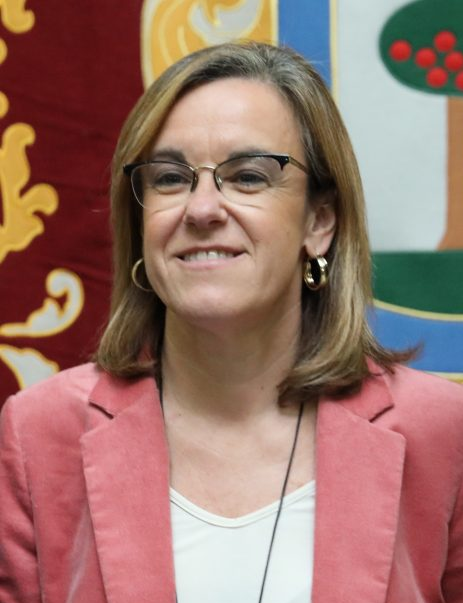 La clave de las cuentas para el próximo año –que superan los 4.823 millones de euros– es hacer realidad los derechos sociales, los derechos de la ciudadanía, como la educación, la protección social y la igualdad. El proyecto, que cuenta con el respaldo del PSOE municipal, ha pasado hoy por la Junta de Gobierno y se elevará al Pleno del mes de diciembre para su aprobación definitiva Entre los compromisos con el Grupo Municipal Socialista figura la inclusión de un Plan de Empleo para Mujeres y la ampliación del permiso de paternidad a ocho semanas.